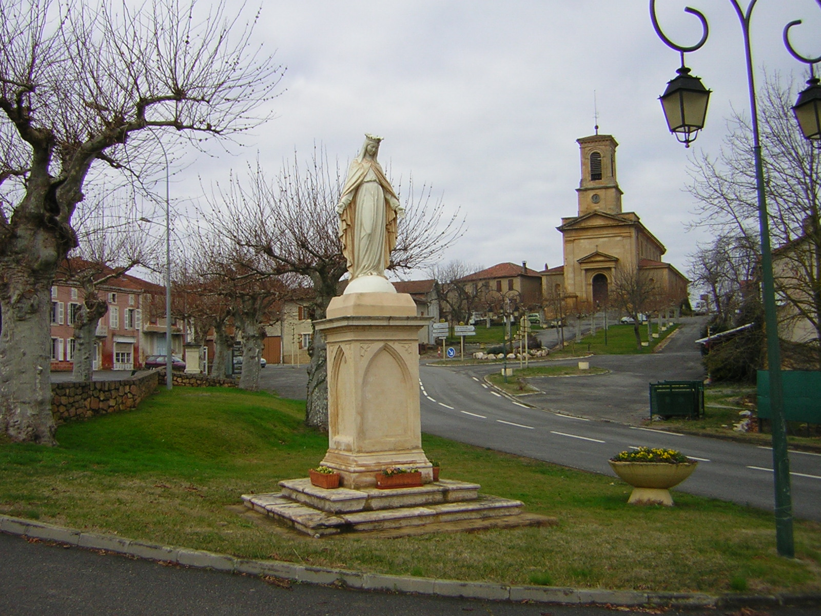 Cassagnabère-Tournas, Haute-Garonne, Midi-Pyrénées, France.